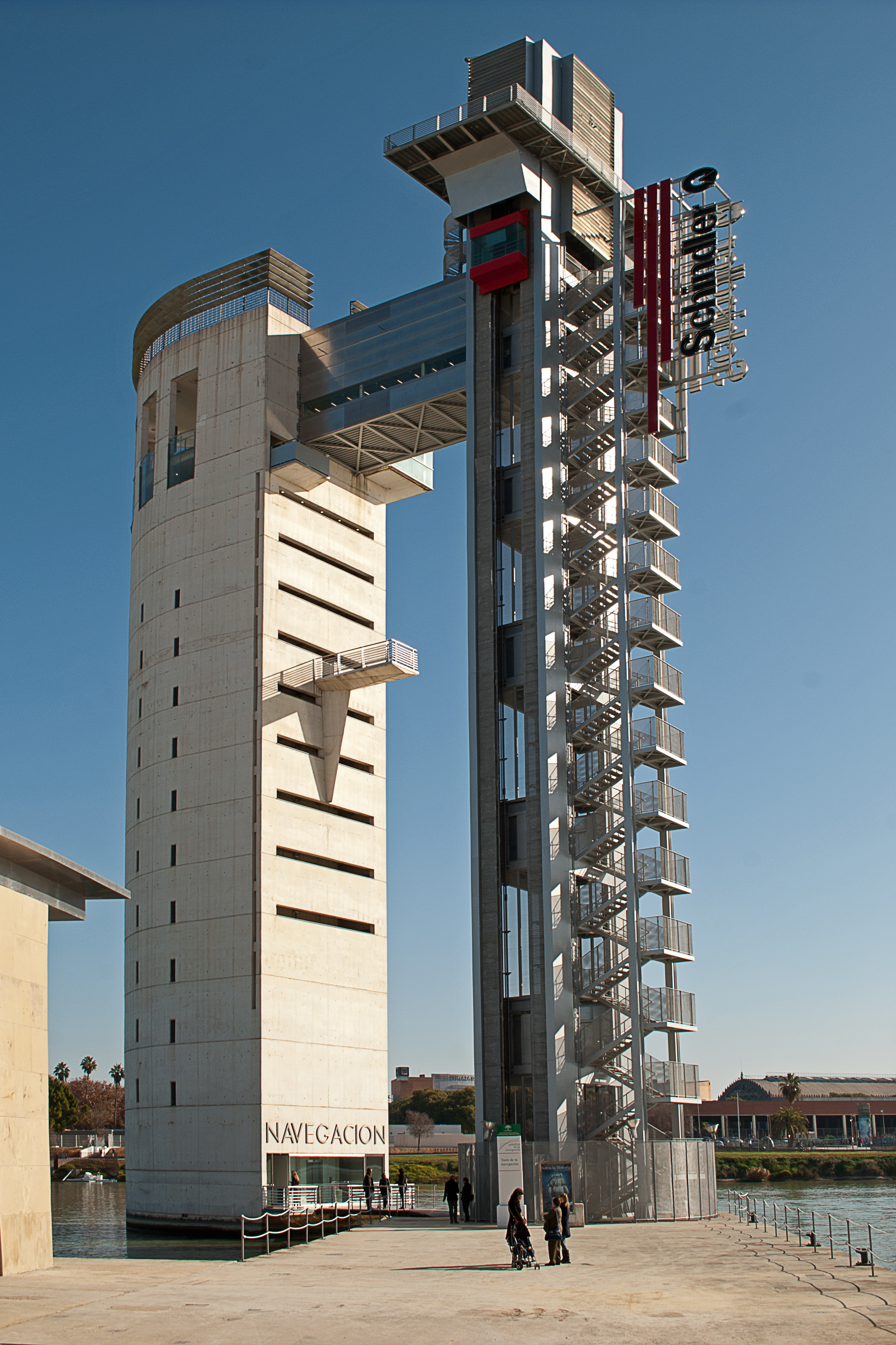 Pabellón de la navegación y Torre Schindler. Sevilla